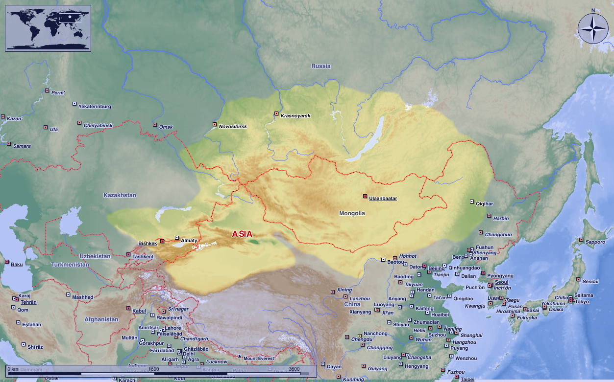 Das Kirgisen-Reich in seiner größten Ausdehung. (Original text: Darstellungskarte zeigt das Kirgisen-Reich, das 840 das stammverwandte Reich der Uiguren zerschlug und dessen Erbe antrat.) erstellt am: 17. aug. 2004